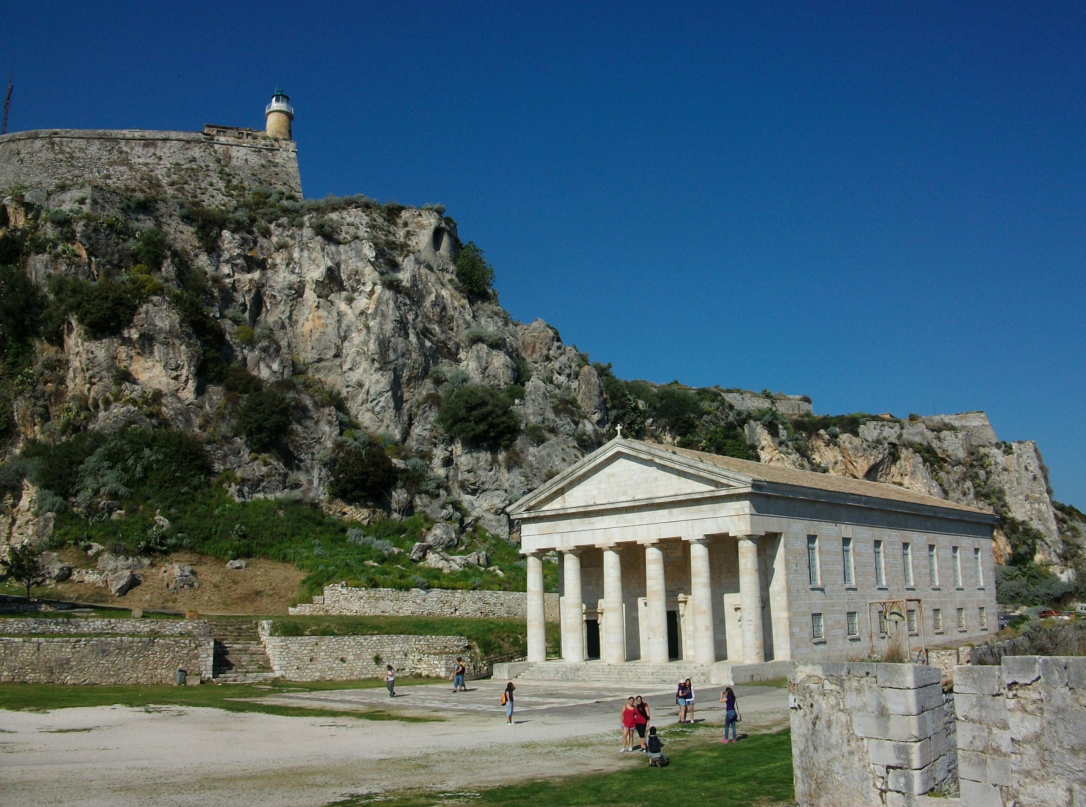 Far i església de sant Jordi, fortalesa vella de Corfú.